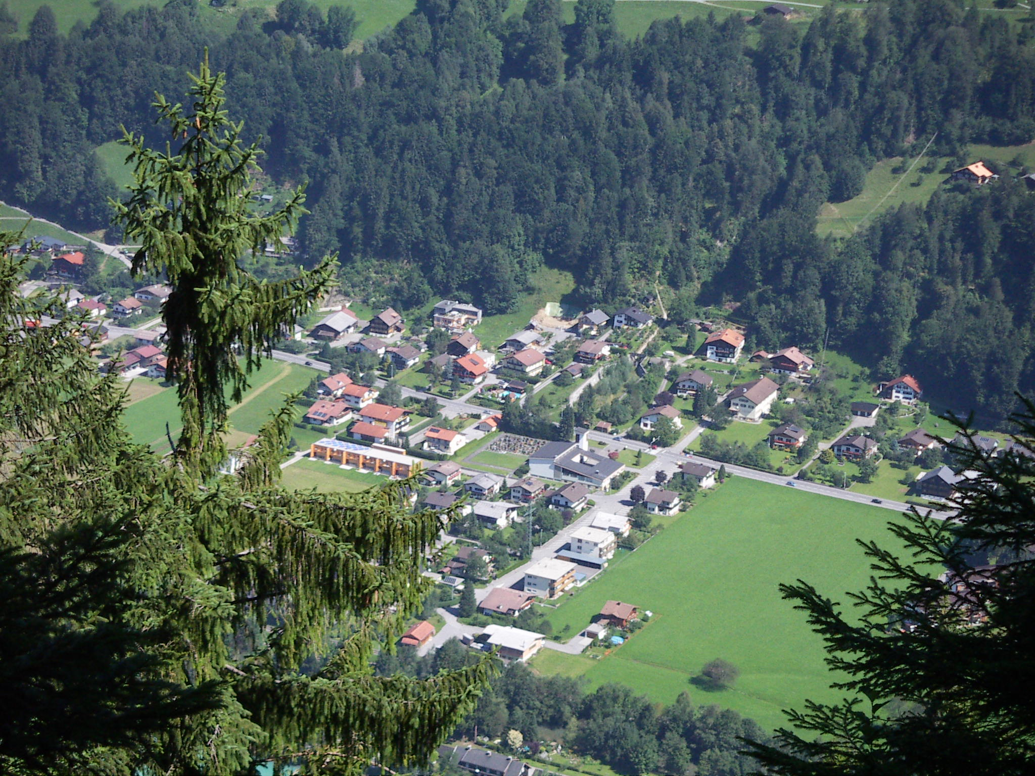 Ortsteil Gantschier, Bartholomäberg, mittig ist die Kirche erkennbar, links davon der Friedhof, dahinter das Auffangbecken der Wildbachverbauung für den Fritzenbach